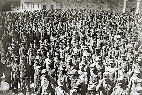 Avstro-ogrski ujetniki zajeti oktobra in novembra 1918 na italijanskem bojišču.